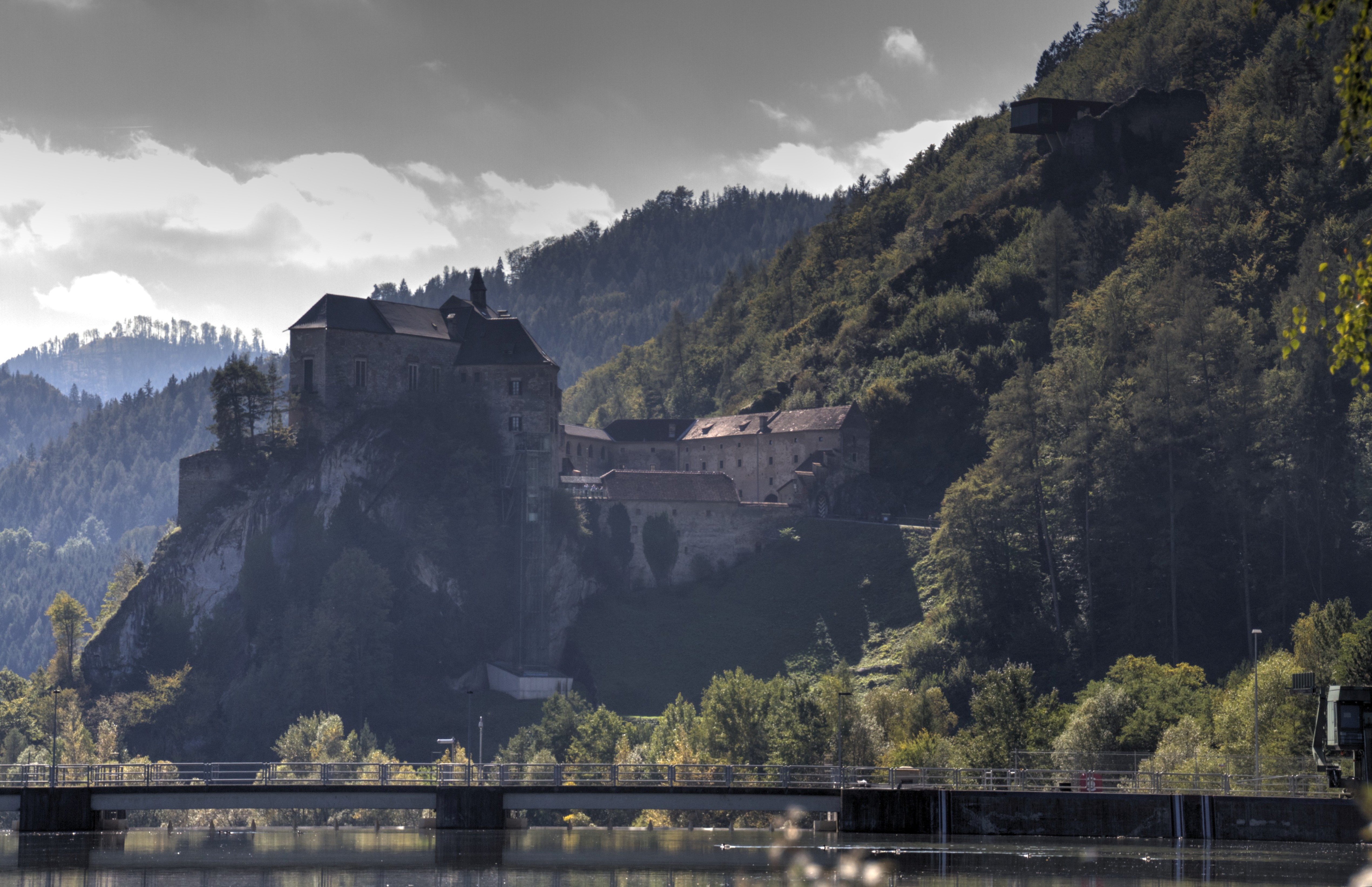 Frohnleiten – Burg Rabenstein, jahrhundertelange Geschichte und moderne Architektur Dieses Bild wurde anlässlich des österreichischen Tags des Denkmals 2014 in der Steiermark eingereicht.